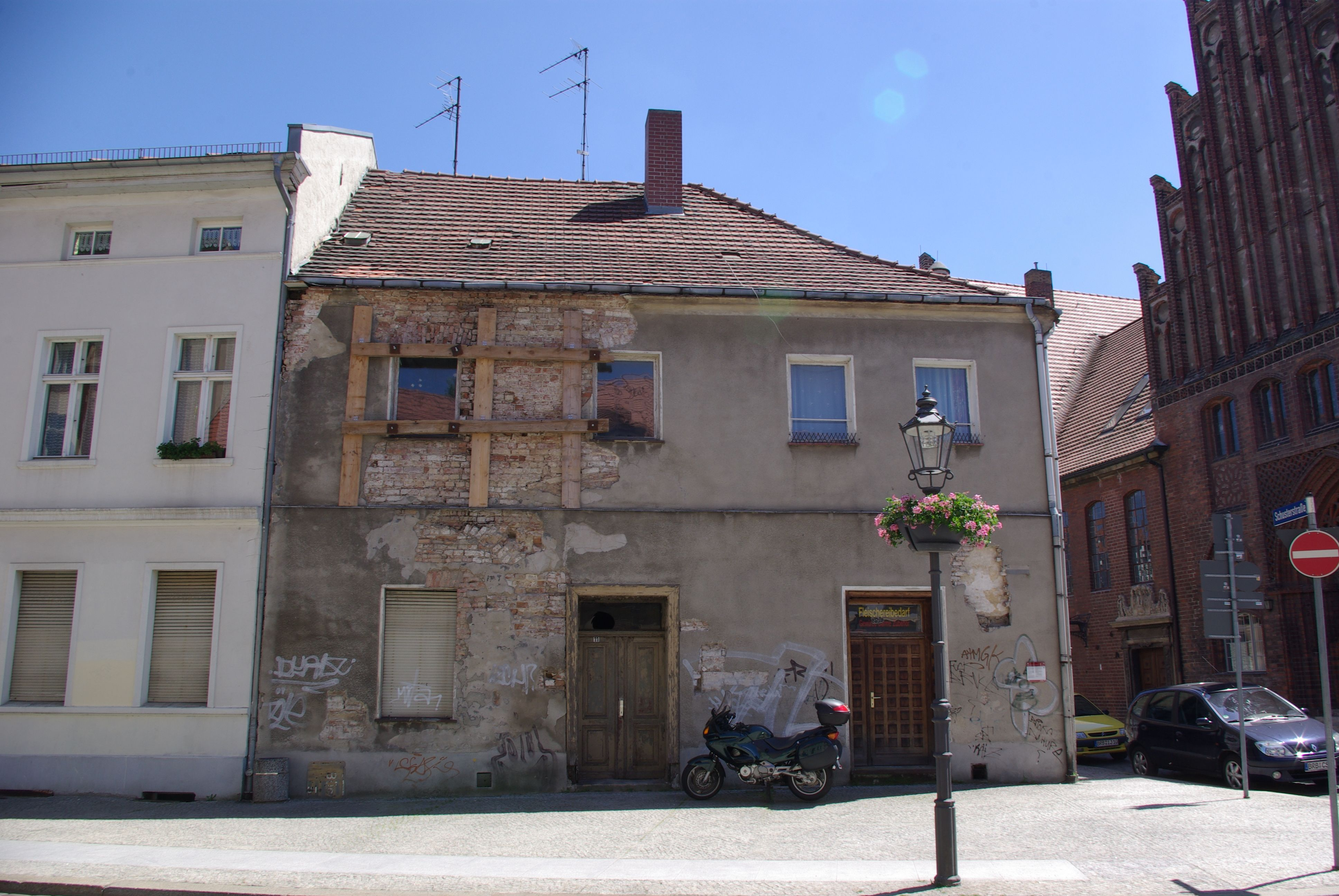 Brandenburg an der Havel, Stadtteil Altstadt. Das Haus in der Straße Parduin 11 steht unter Denkmalschutz.